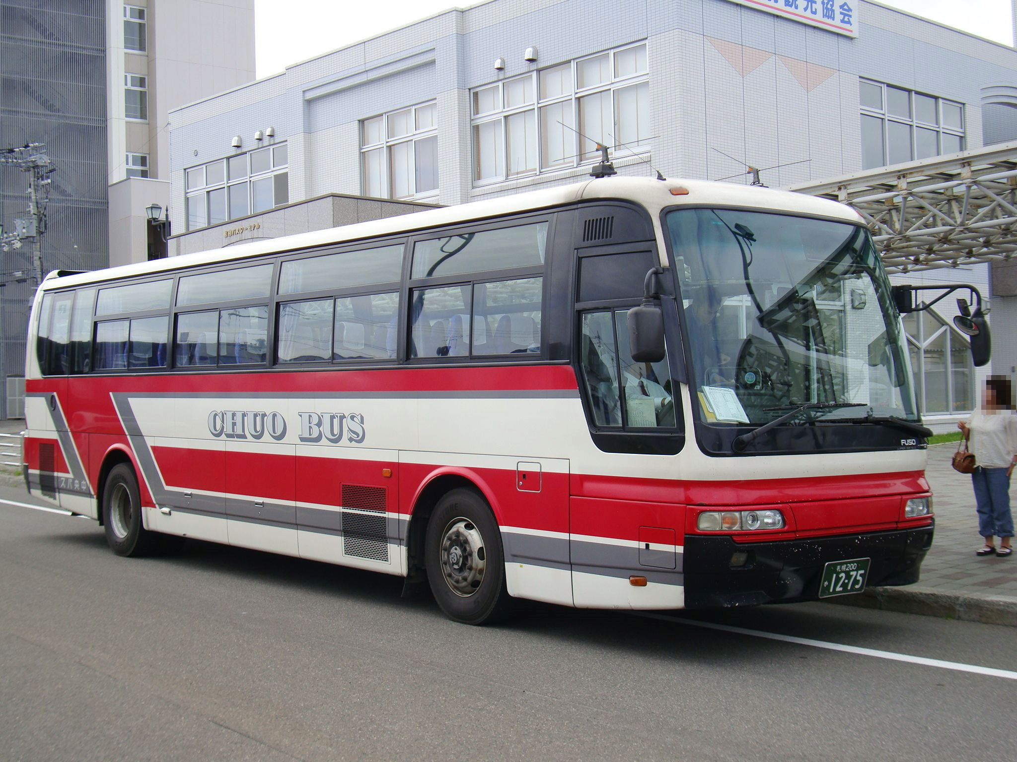 "Kōsoku Ryūhyō Monbetsu gō" Sapporo to Monbetsu